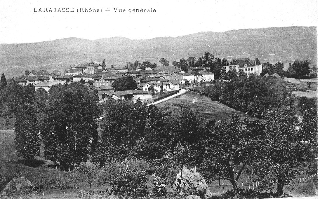 Larajasse (Rhône) - Vue générale